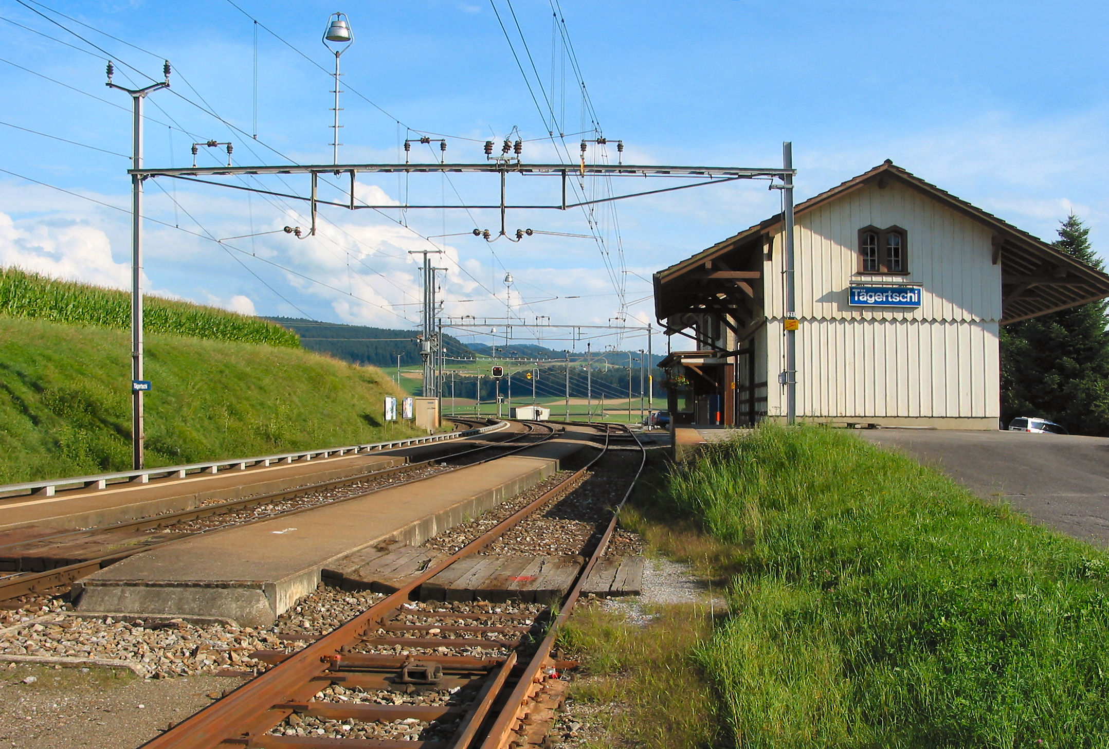 Fahrleitungsquerjoch im Bahnhof Tägertschi, Kanton Bern, Schweiz.